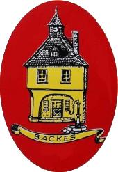 Inoffizielles Wappen von Rohnstadt